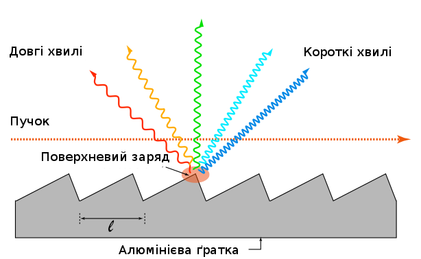 Пояснення до ефеку Сміта-Перселла